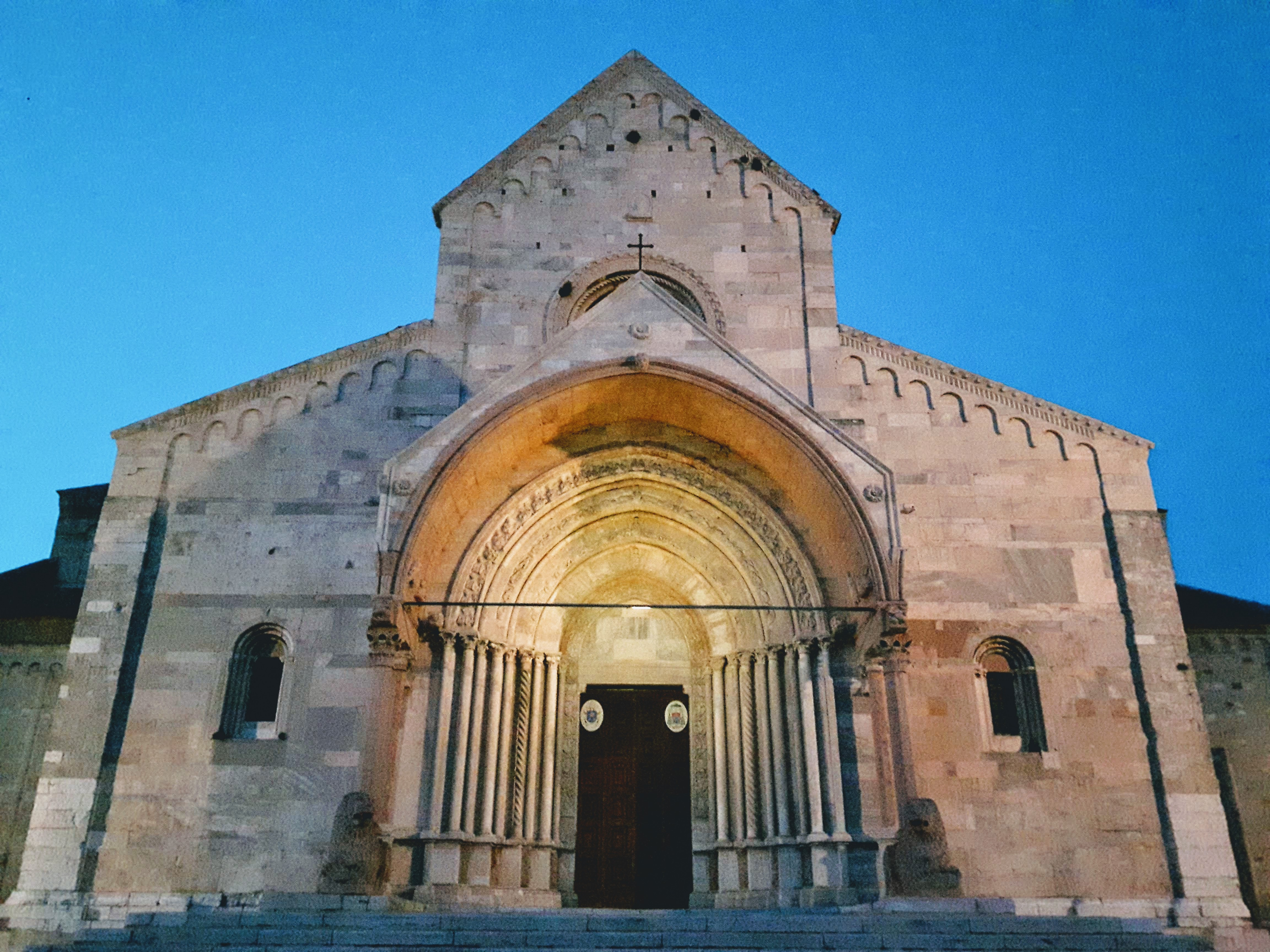 DUOMO DI ANCONA. Dedicato a san Ciriaco, è la cattedrale metropolitana dell'arcidiocesi di Ancona-Osimo. È una chiesa medioevale in cui lo stile romanico si fonde con quello bizantino, evidente nella pianta e in molte decorazioni. Sorge in scenografica posizione alla sommità del colle Guasco, già occupata dall'Acropoli della città greco-dorica, da dove domina tutta la città di Ancona e il suo golfo. Nel maggio del 1926 papa Pio XI l'ha elevata alla dignità di basilica minore.